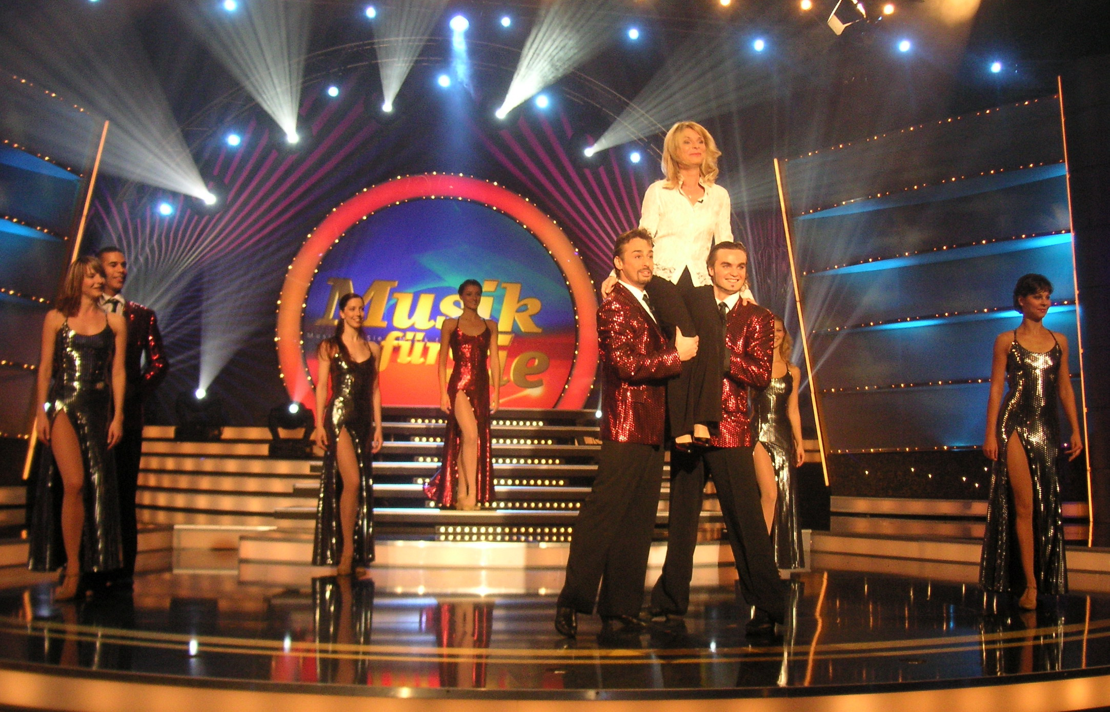 Uta Bresan mit dem Deutschen Fernsehballett bei Showproben für "Musik für Sie" (MDR) 2007